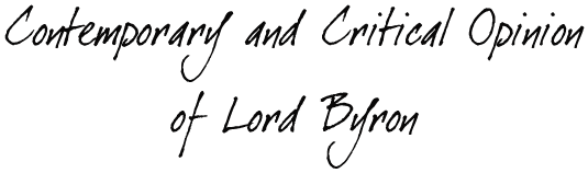 Robert Southey. from the Preface to his Vision of Judgment (1821)